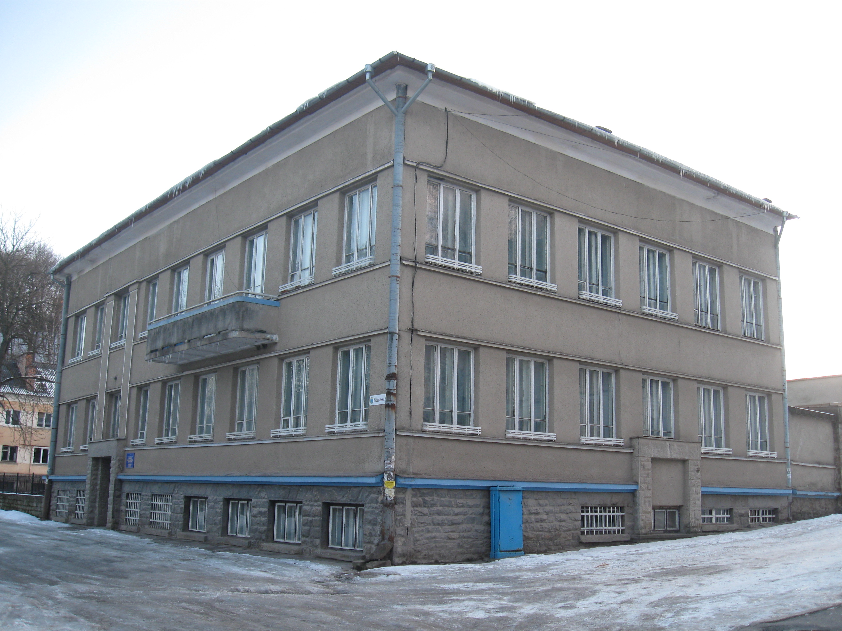 Starostwo Powiatowe w Trembowle (II Rzecz Pospolita). Obecnie - szpital